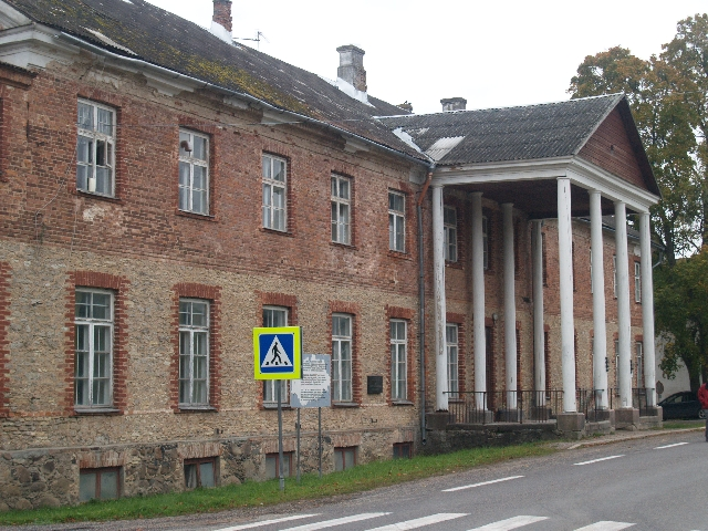 Eesti Aleksandrikooli hoone. Põltsamaa vald, Väike-Kamari küla